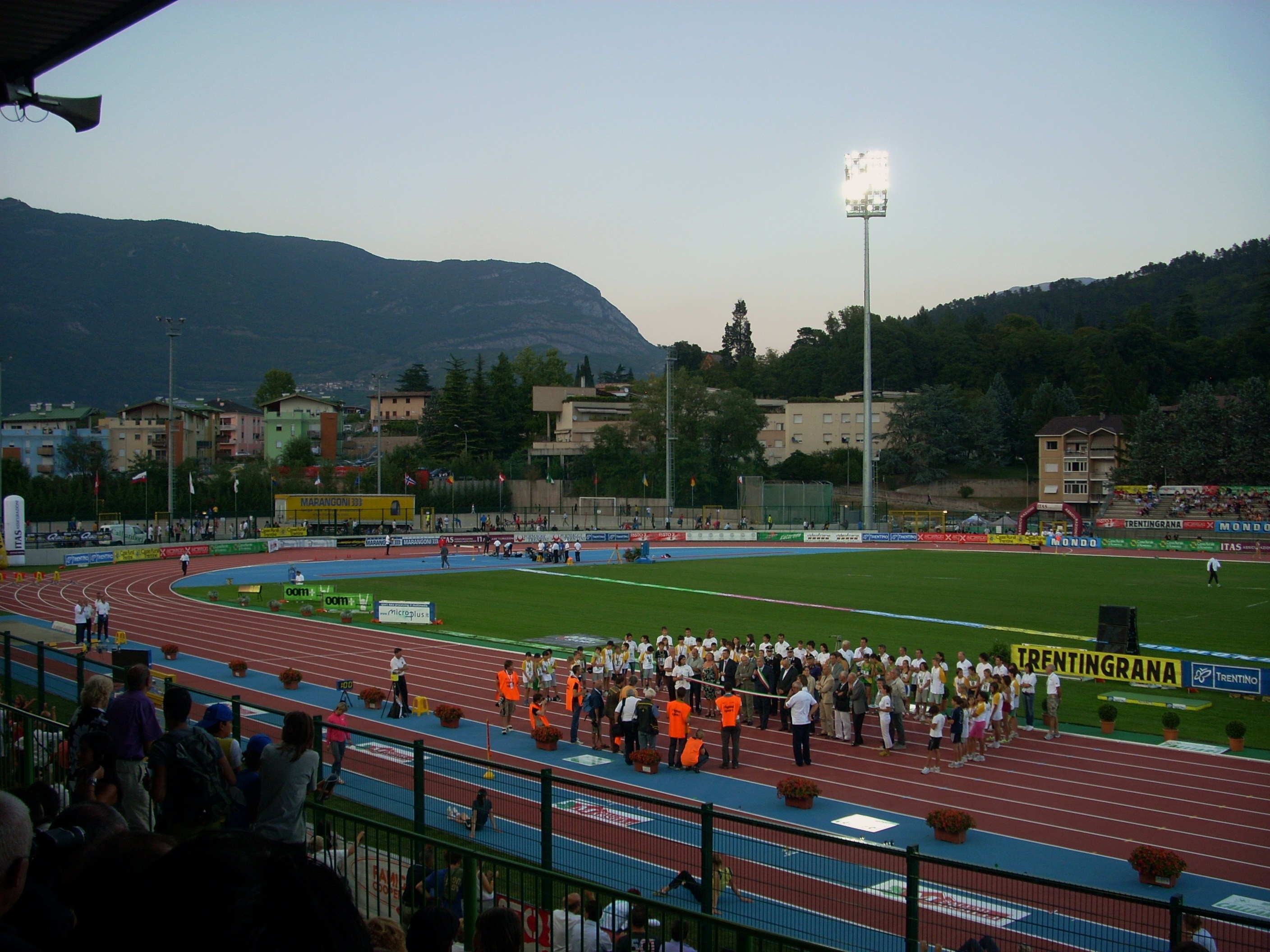 Lo Stadio Quercia in occasione dell'inaugurazione dopo i lavori del 2009